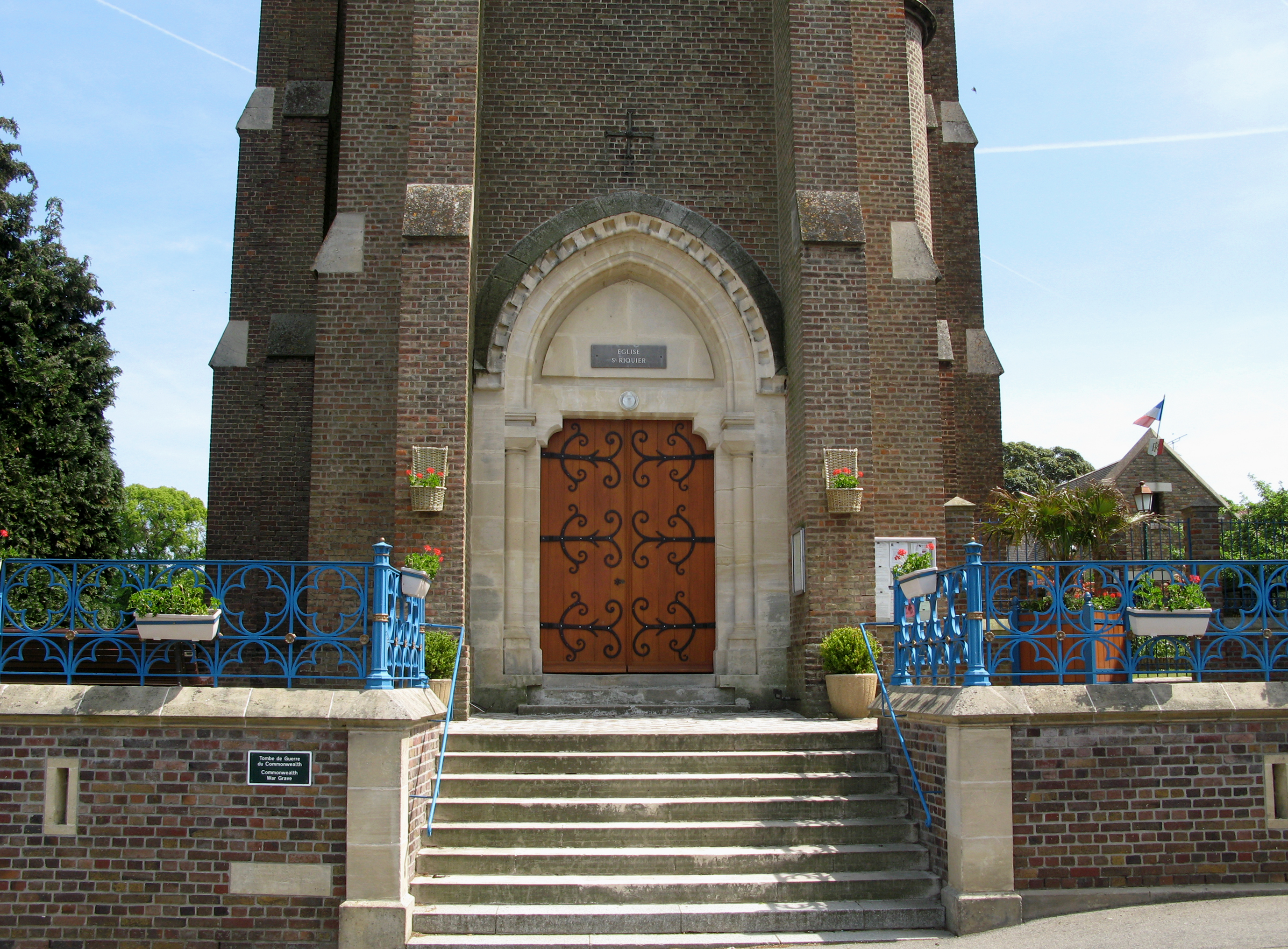 Dreuil-lès-Amiens (Somme, France) - L'accès à l'église et au cimetière. .